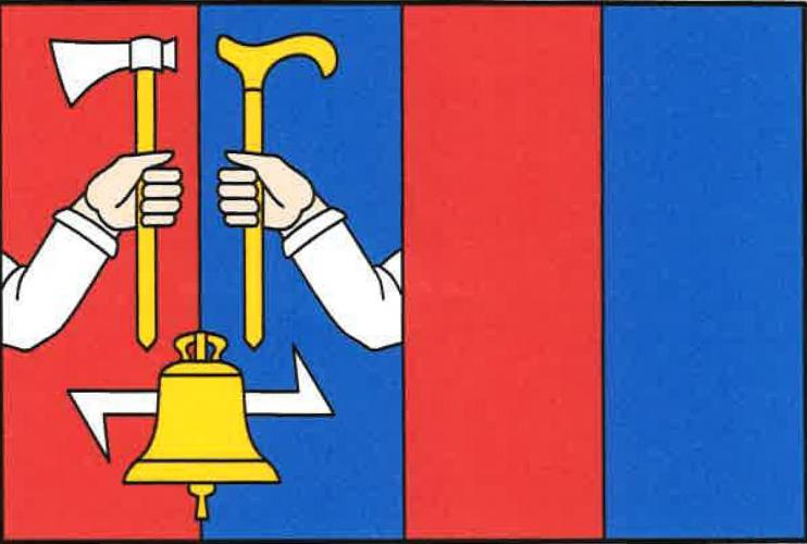 Čakov, okres Benešov, vlajka